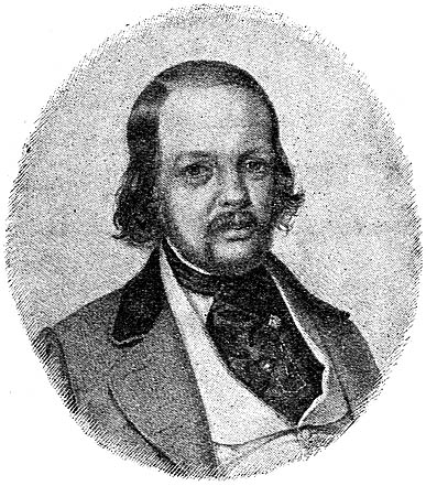 Oscar Patric Sturzen-Becker (1811-1869) ,(pseud. Orvar Odd)